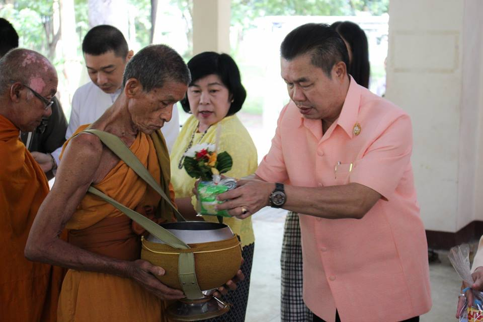 วันกตัญญู โรงเรียนสันป่าตองวิทยาคม